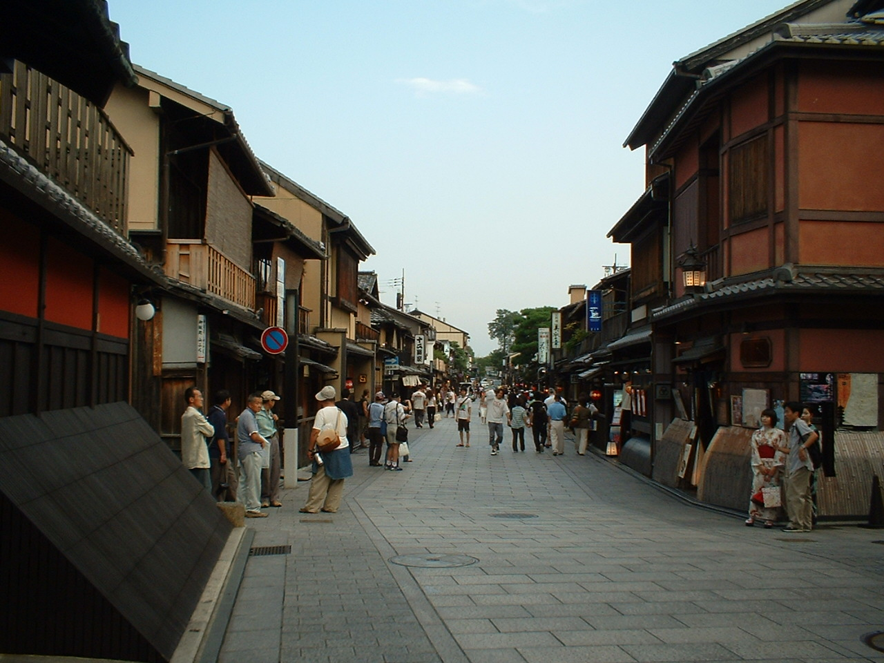 Calle del barrio de Gion, en Kioto, Japón. Las edificaciones mantienen el estilo de finales del siglo XIX.